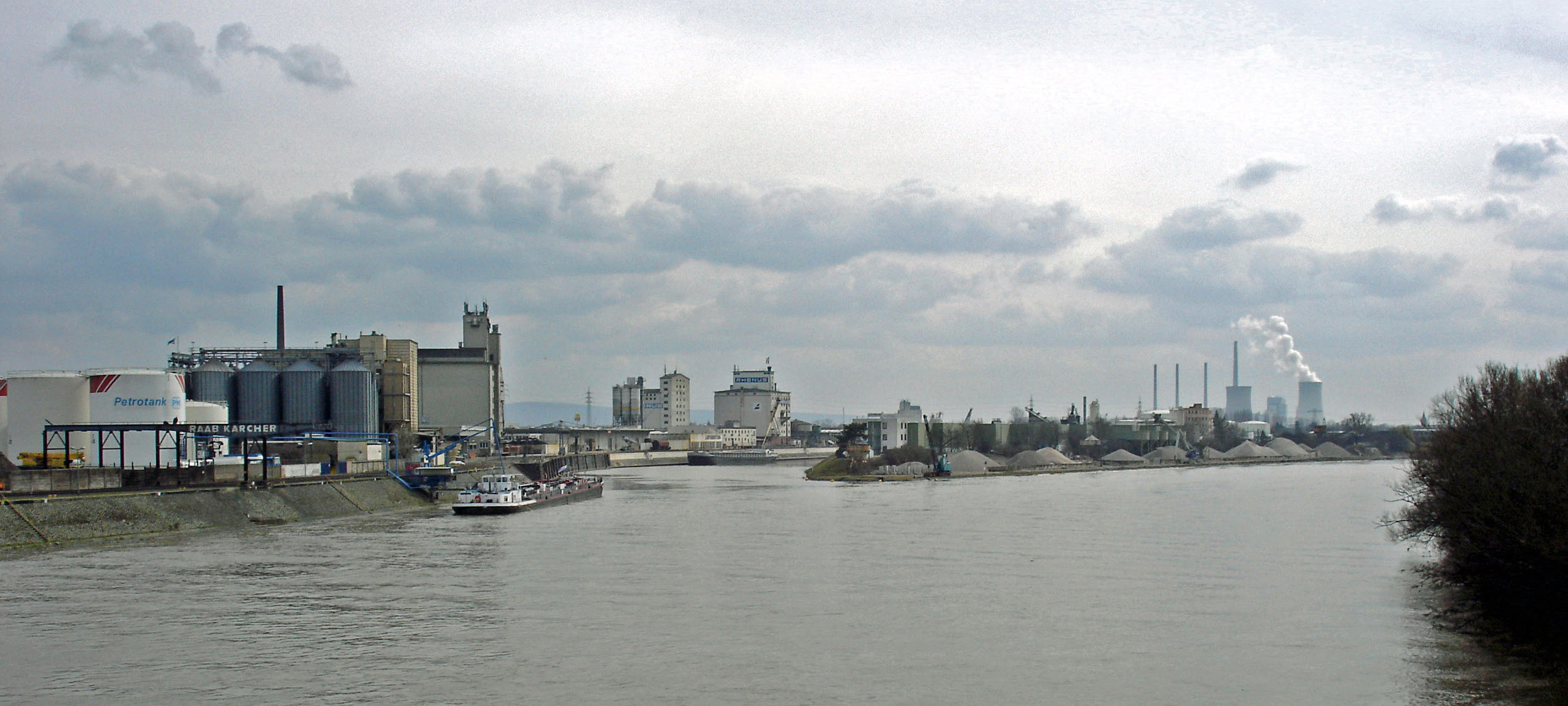 Der Hafen in Hanau von der Steinheimer Bruecke aus